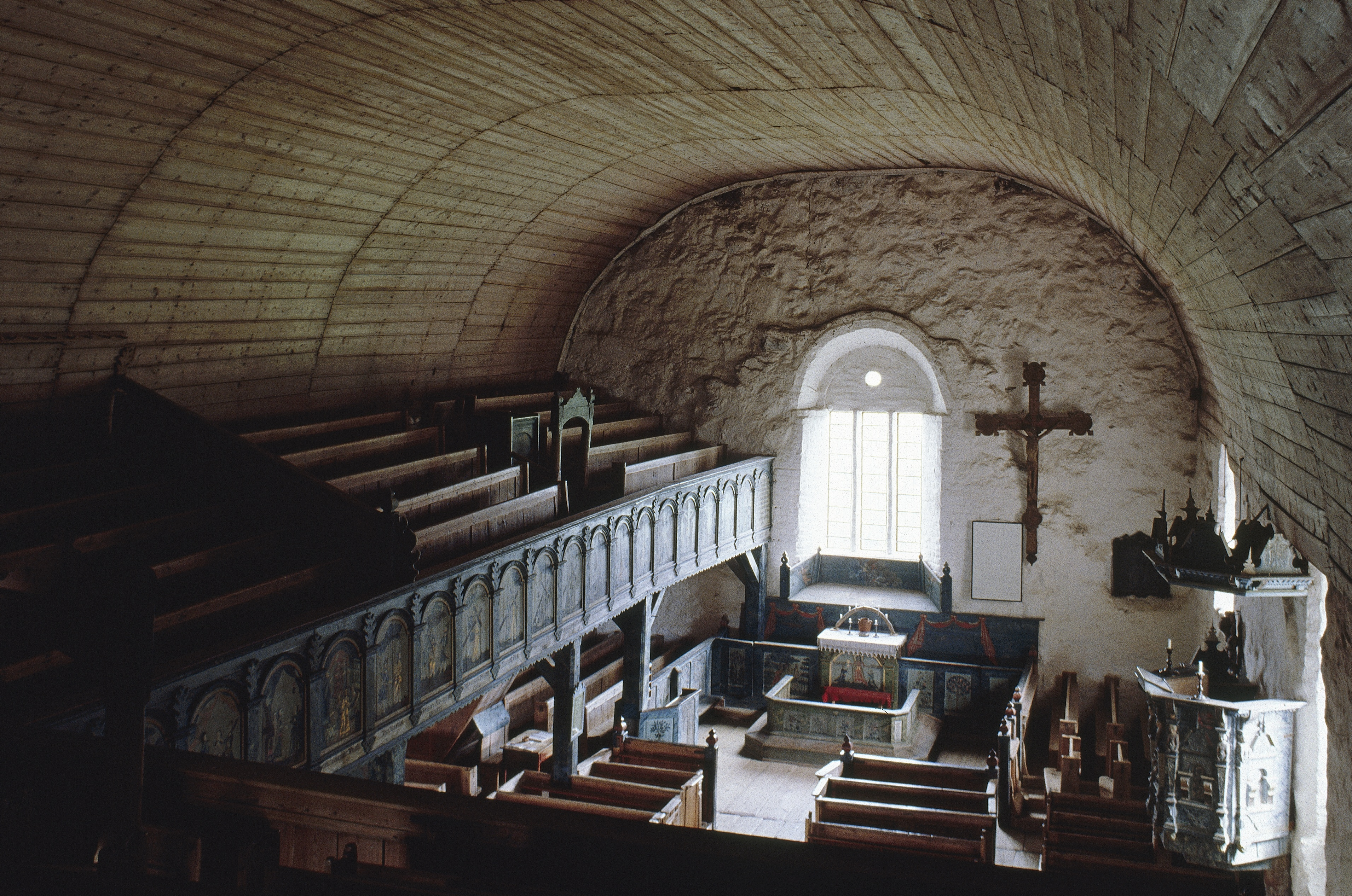 Näkymä lehteriltä kohti alttaria. Vanha sisustus ennen tuohopolttoa.